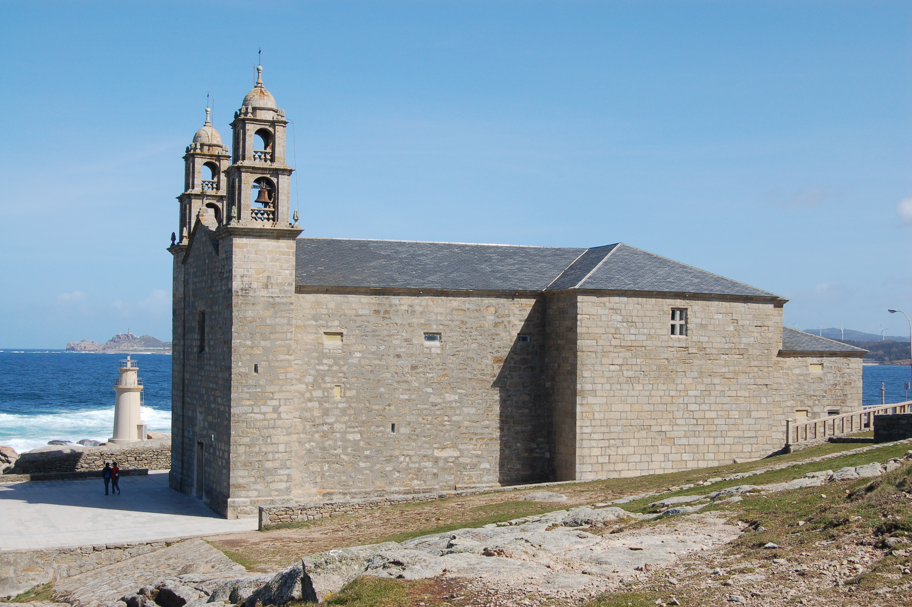 Santuario da Virxe da Barca